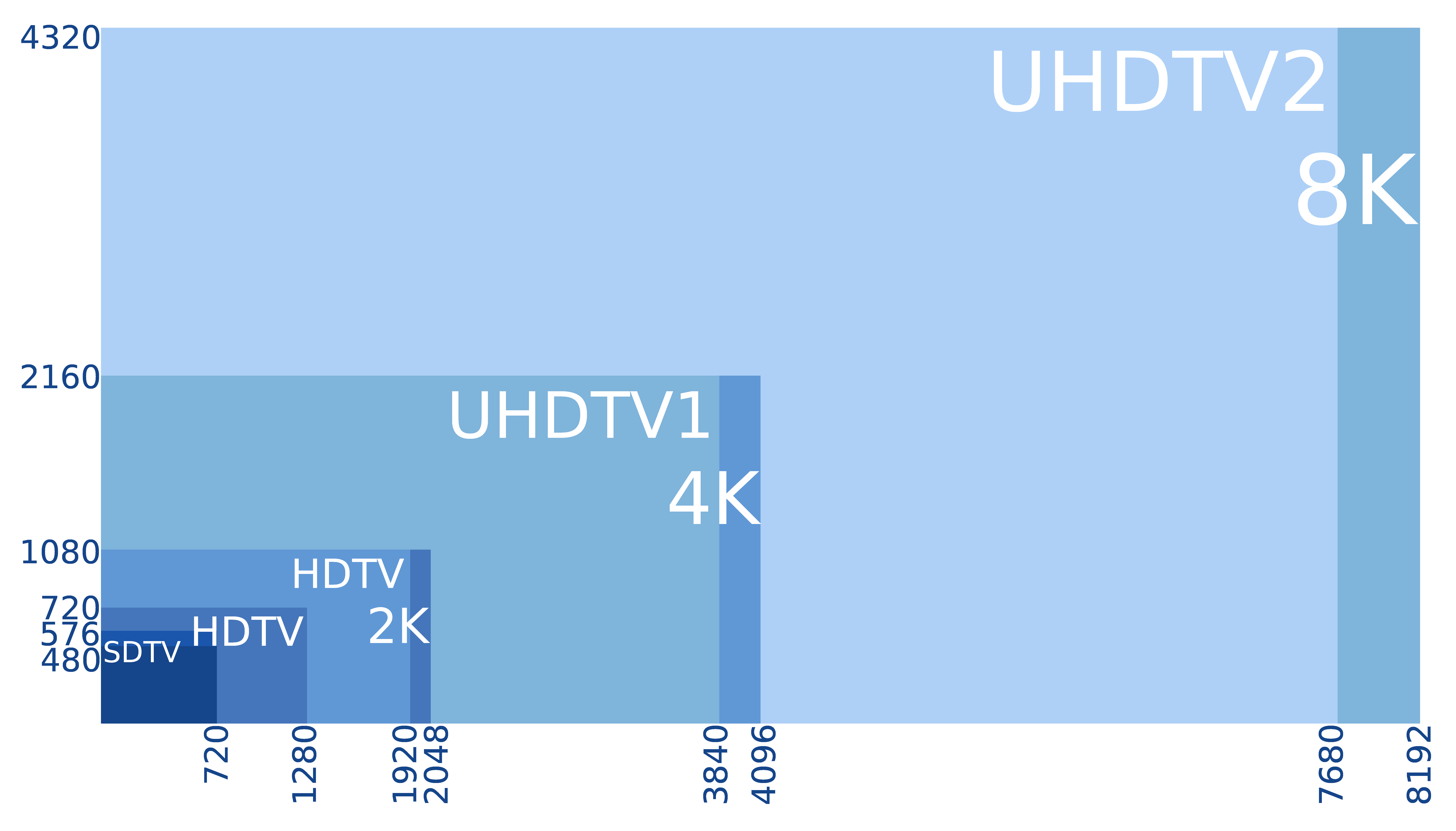 Définitions d'image pour la TV SD, HD et UHD ainsi que pour le cinéma 2K, 4K et 8K